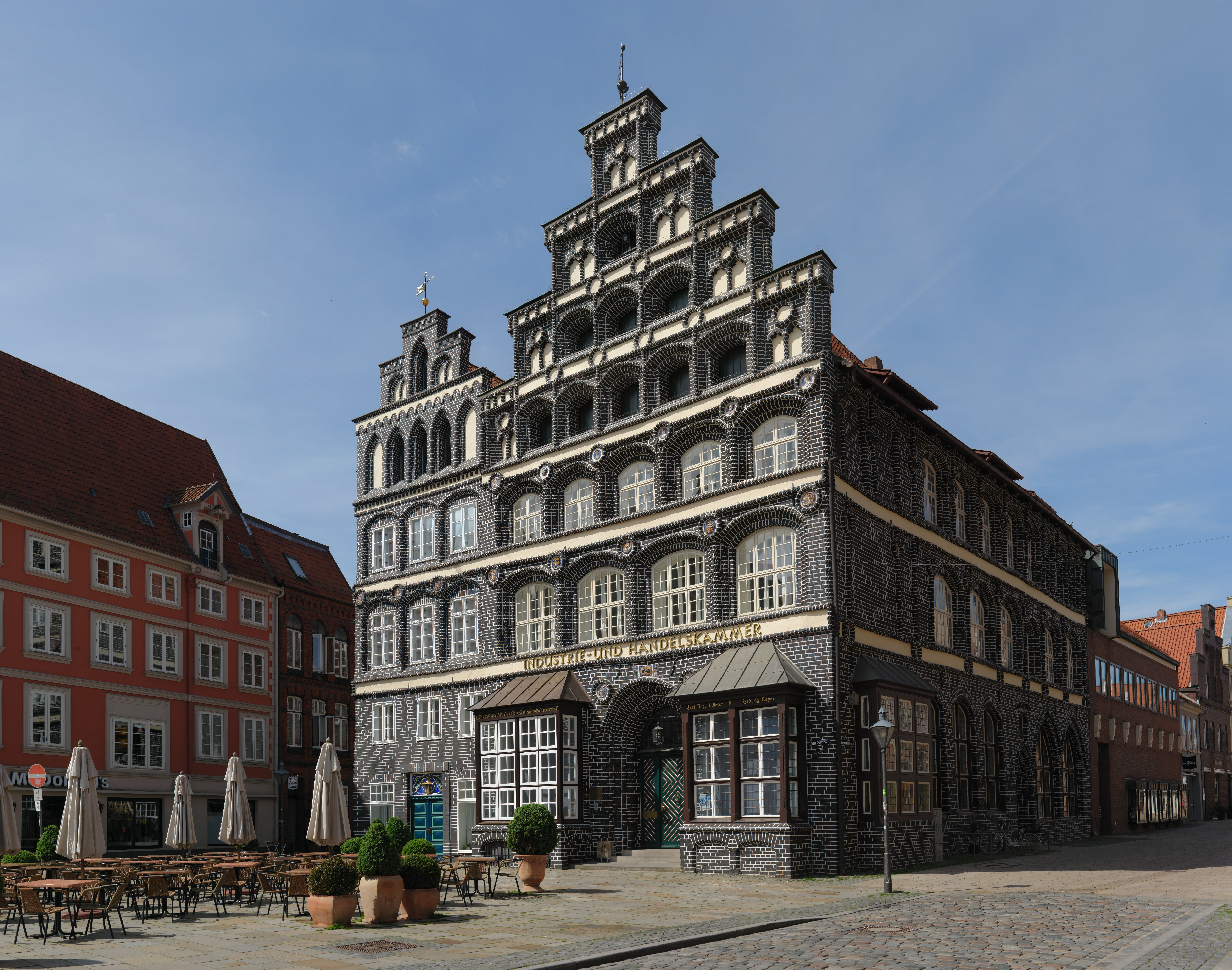 Industrie- und Handelskammer Lüneburg. Es sind die Häuser Am Sande 1 (rechts) und 2 (links)